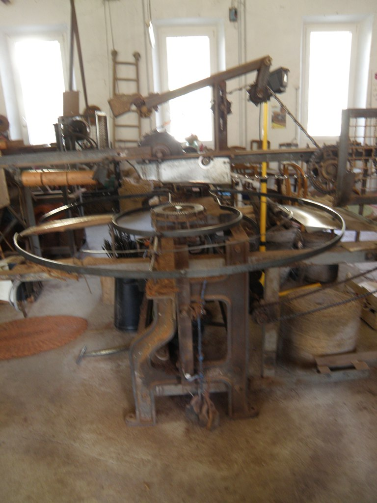 Machine à fabriquer les scourtins Scourtinerie à Nyons